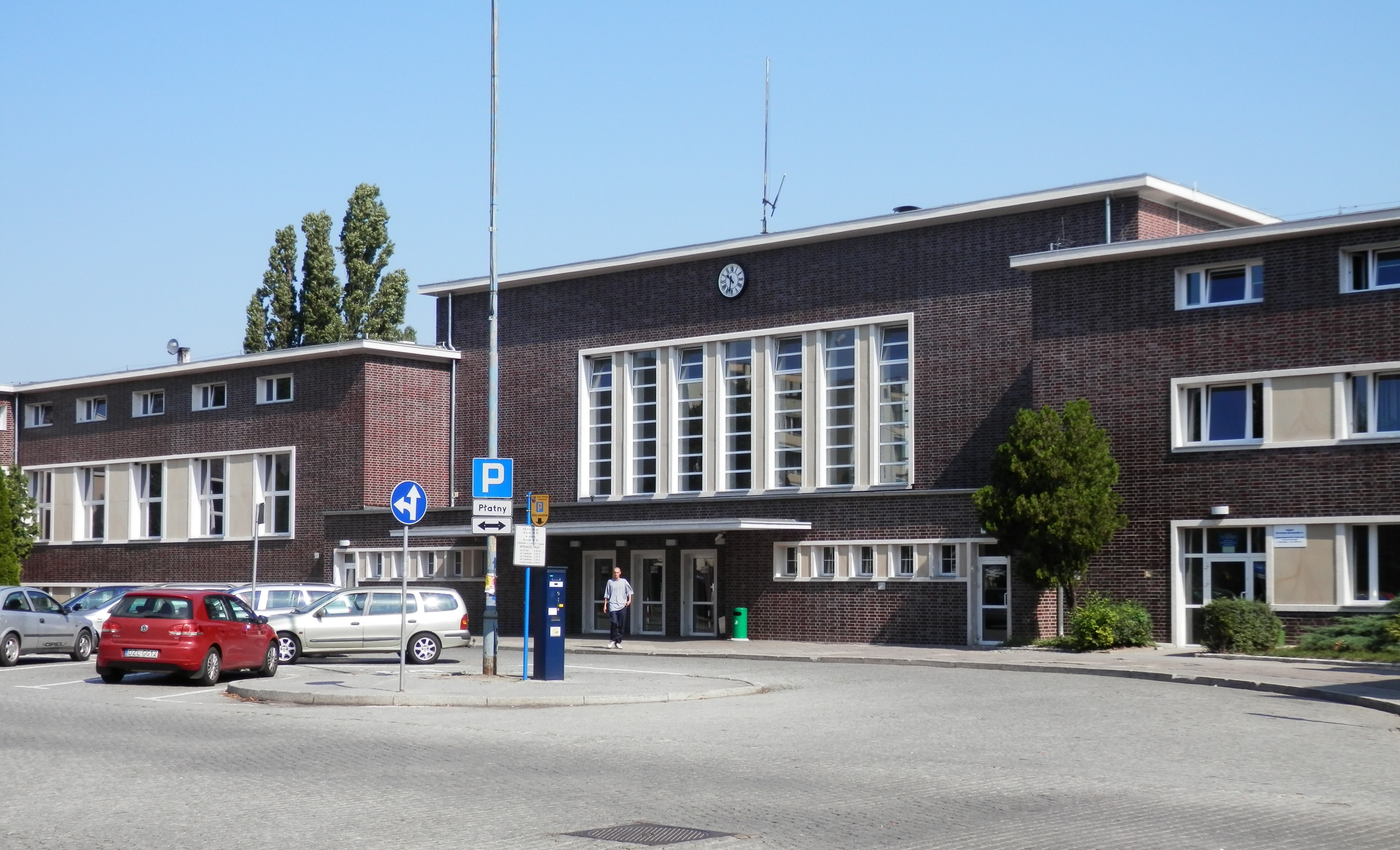 Glogow, Poland